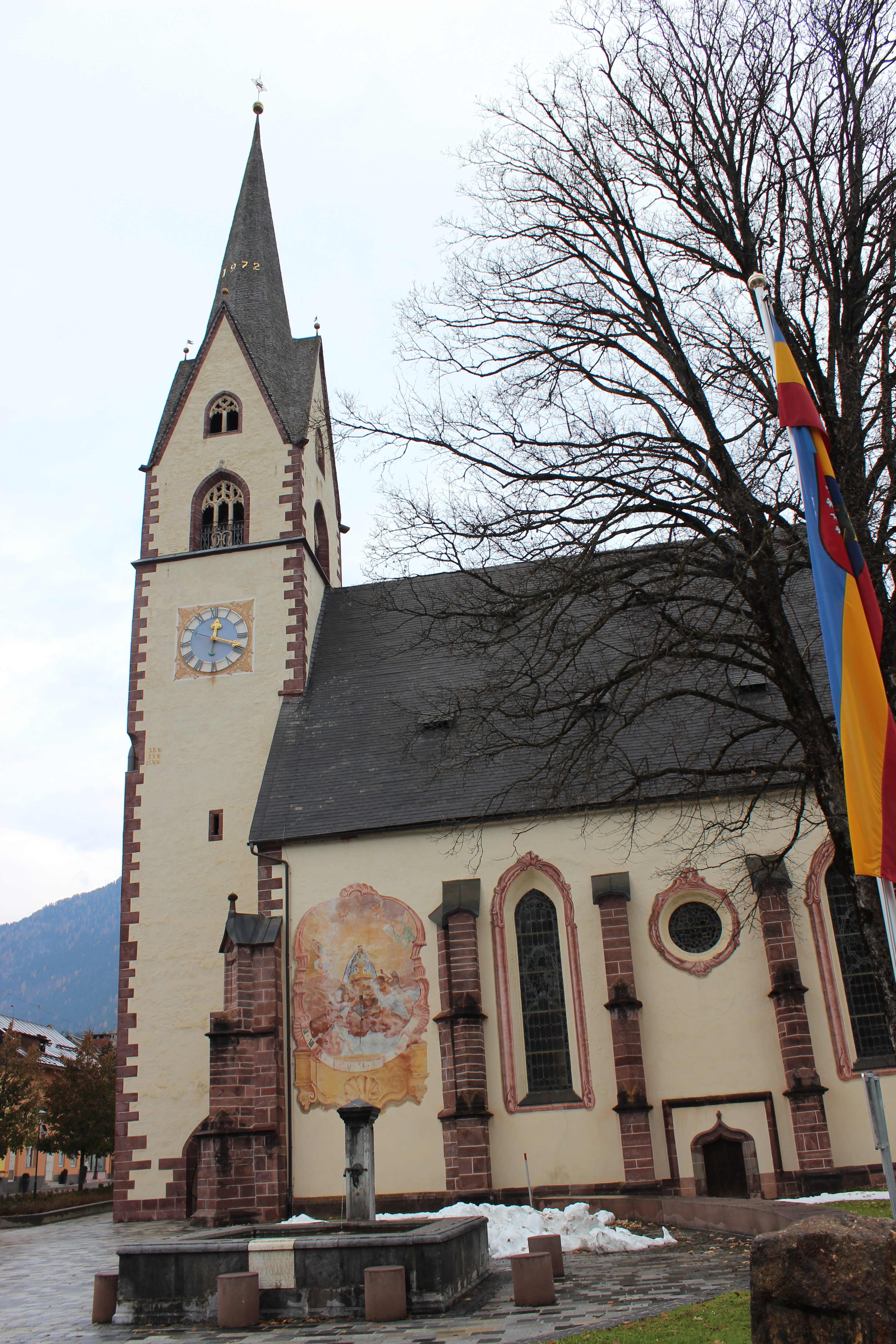 Kath. Pfarrkirche Unsere Liebe Frau in der Kärntner Gemeinde Kötschach-Mauthen, Österreich.